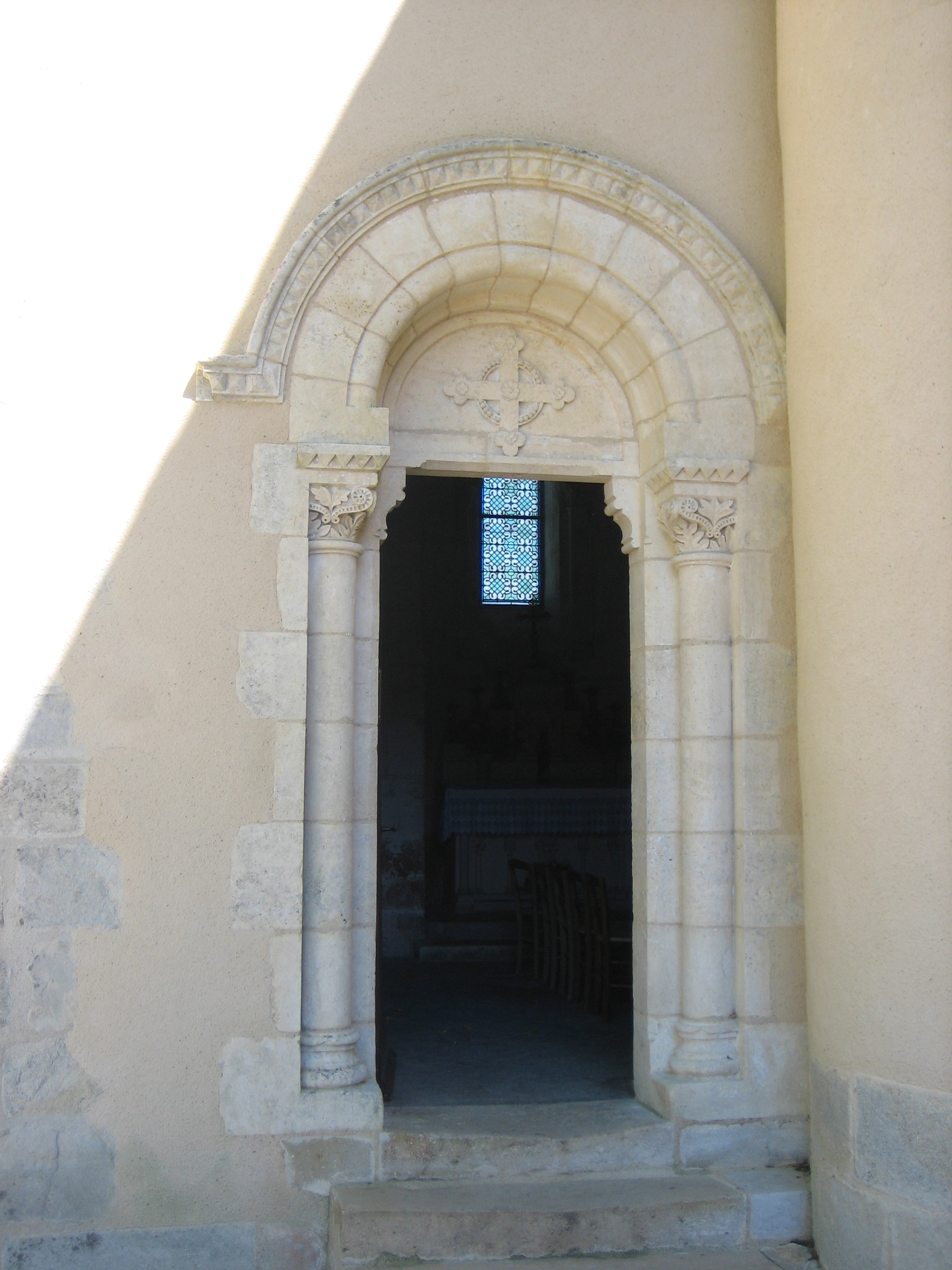 Images de la commune et de l'église